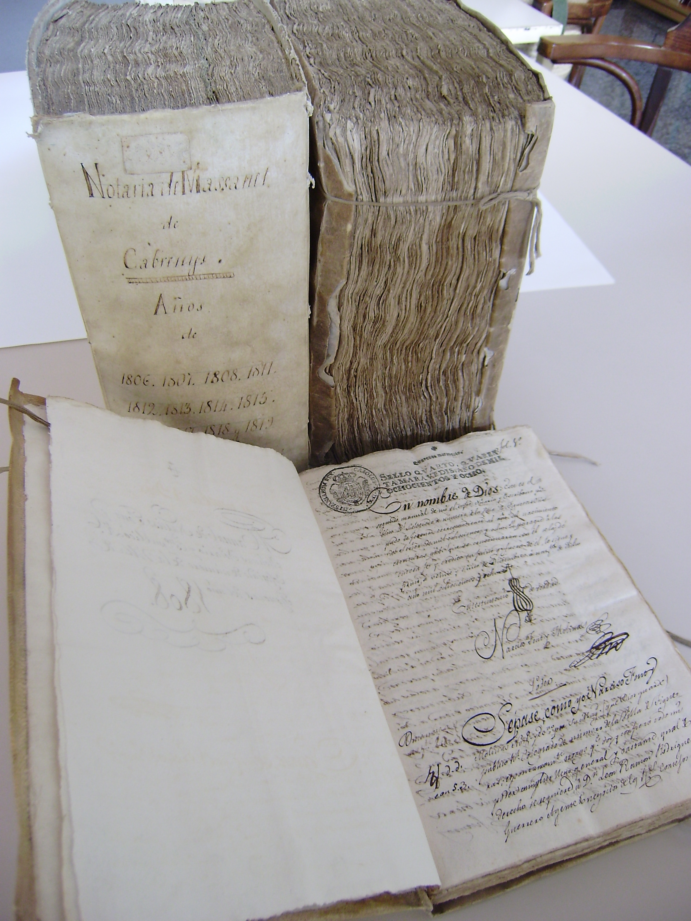 Els protocols notarials del districte de Figueres datats fins al 1799 estan dipositats a l´Arxiu Històric de Girona i els compresos entre aquest any i l´últim any consultable, és a dir, els que tenen més d´un segle d´antiguitat, són a l´ACAE, en el qual s´ingressen cada any en virtut de la resolució del Col·legi de Notaris de Barcelona de 2 de març de 1995. La partició es va fer al mes de juliol del 1938, en què el notari de Figueres, Evarist Vallès, va fer lliurament de tota la documentació notarial anterior al 1800 per tal que fos traslladada a l´arxiu-refugi de Viladrau per raons de seguretat. Aquests protocols més endavant serien els que passarien a Girona en el moment de la posada en funcionament del nou Archivo Provincial. El catàleg del fons notarial de tot el districte de Figueres va ser publicat, en dos volums, per la Fundació Noguera de Barcelona, dins de la Col·lecció d´Inventaris d´Arxius Notarials de Catalunya on apleguen la descripció pormenoritzada de més de vuit mil llibres. Els protocols de l´ACAE sumen 1643 llibres (2008). Dades tècniques Títol: "Segundo Manual" del notari Narcís Font de Figueres Data: 1808 Suport material: paper amb cobertes de cartró folrat de pergamí. Mides: 225 x 320 mm.